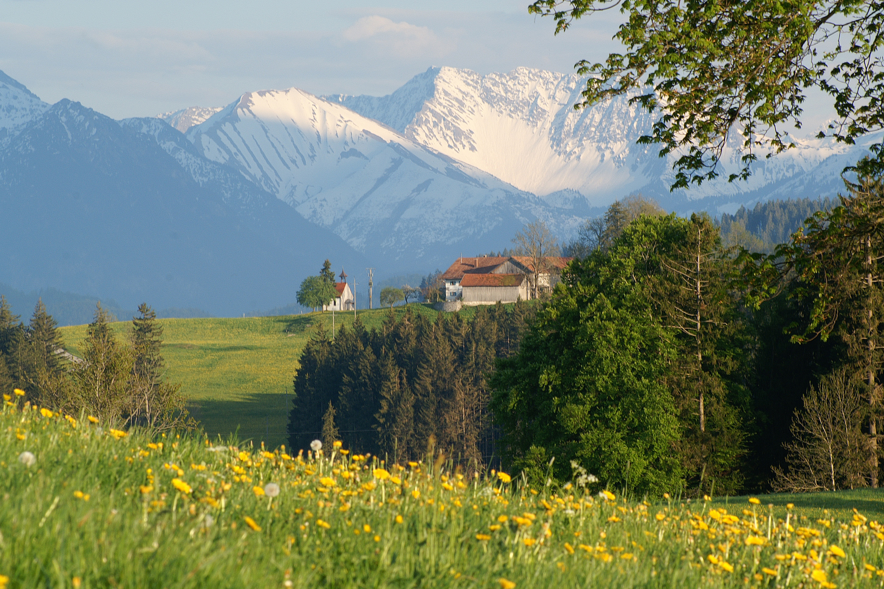 Schlosshof, Rückholz